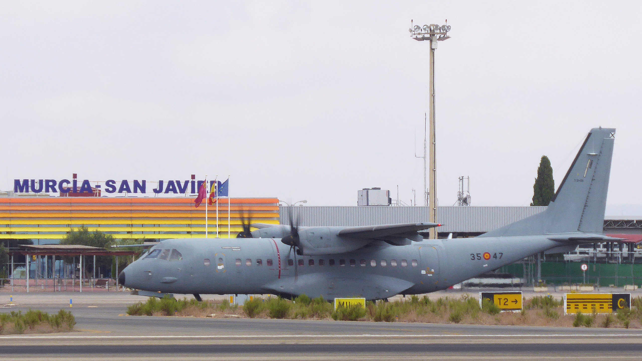 Spanische Luftwaffe CASA-EADS C-295M auf Taxiway to start Flugplatz Murcia-San Javier nahe Mar Menor Region Murcia Spanien - Foto Wolfgang Pehlemann P1120549